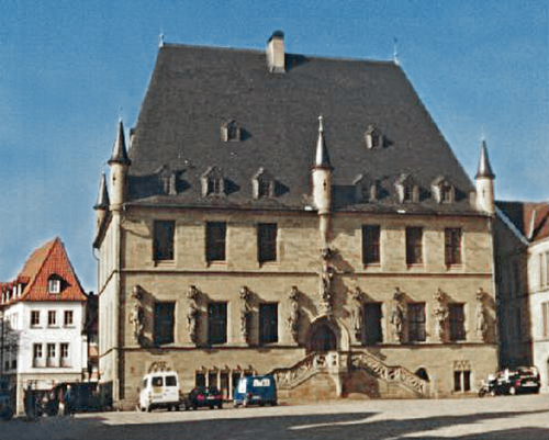 einfache Bildoptimierung eines unscharfen Fotos mit Komprimierungsartefakten